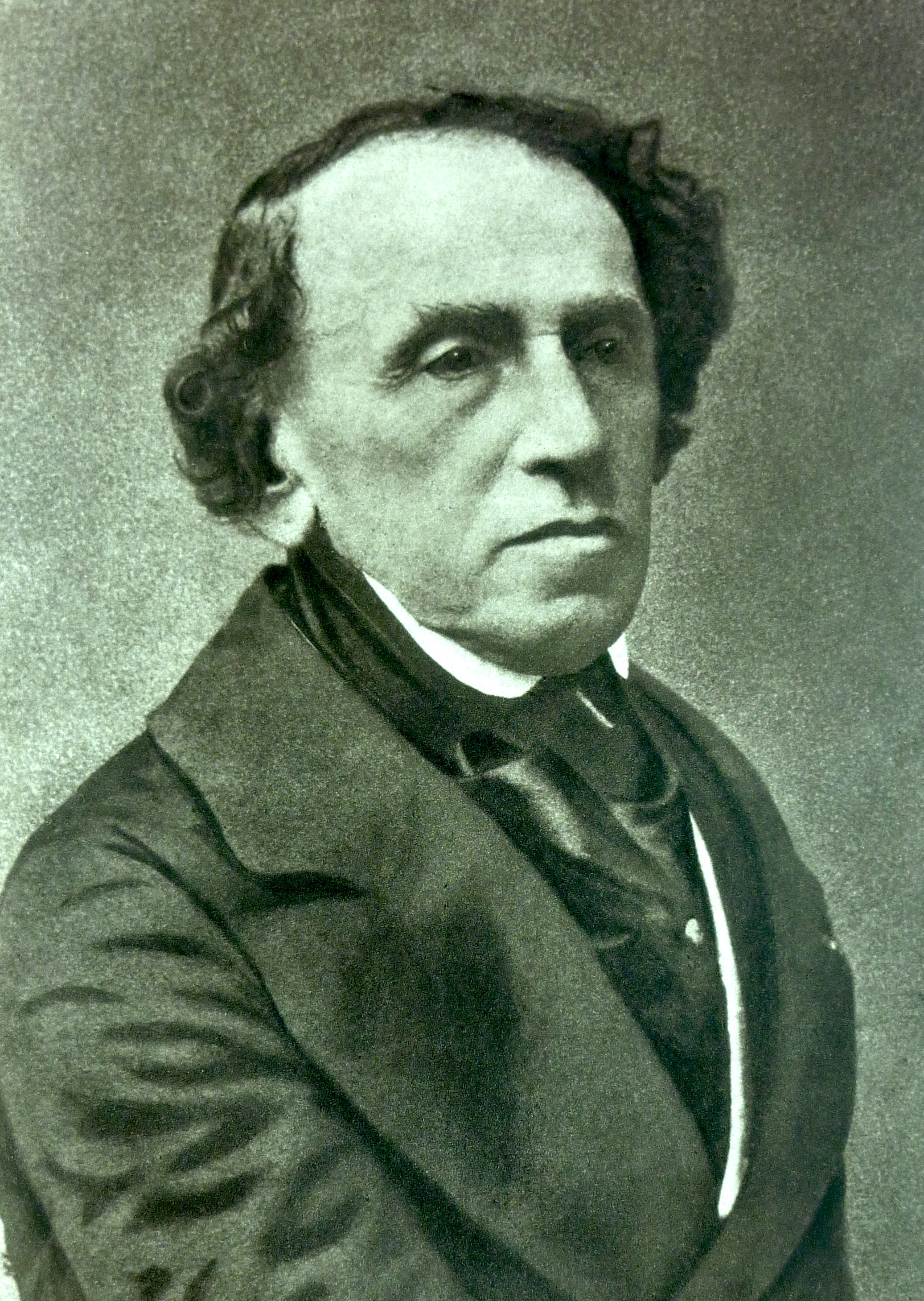 Giacomo Meyerbeer, Foto von Nadar